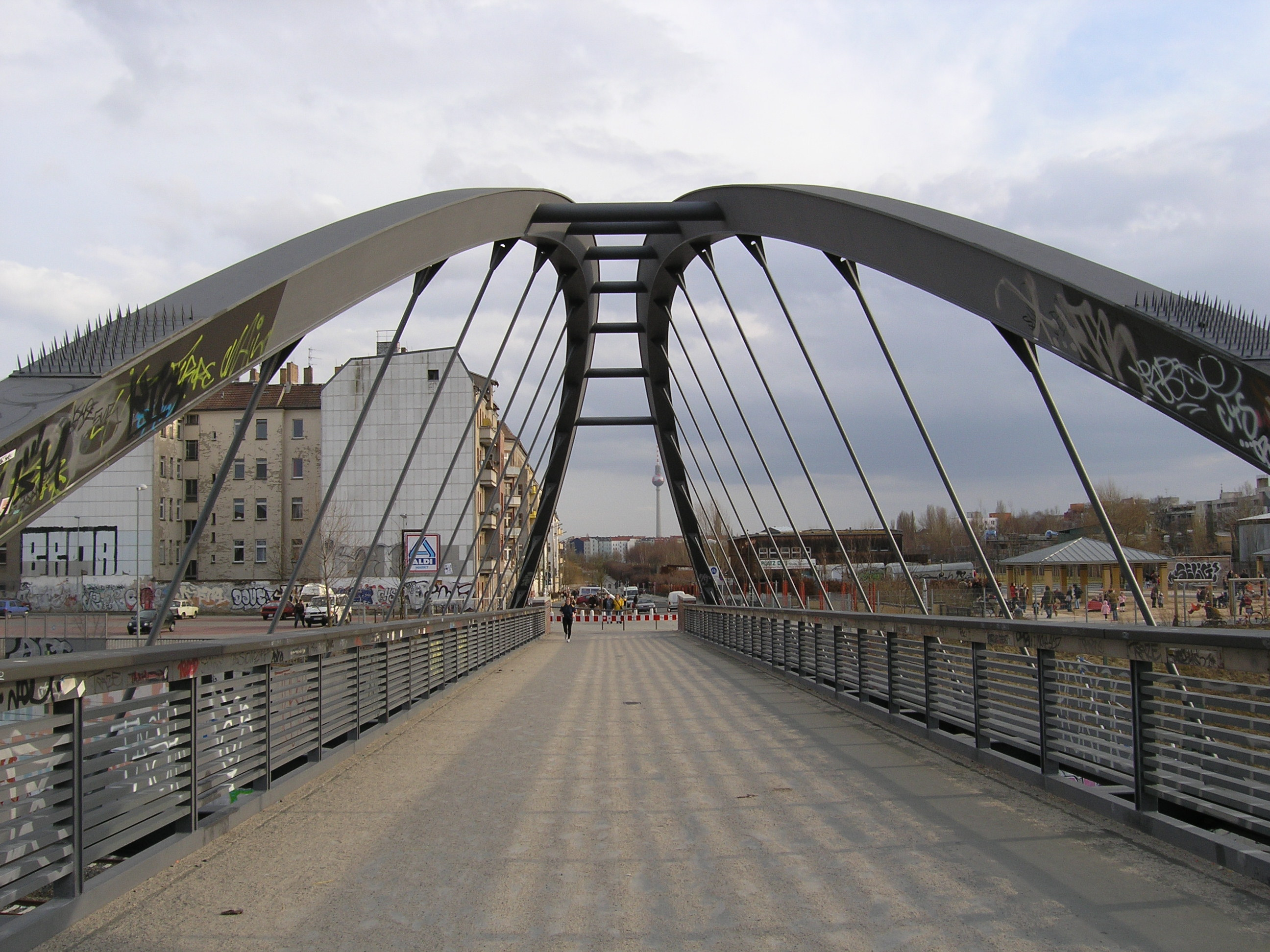 Schwedter Steg, Berlin